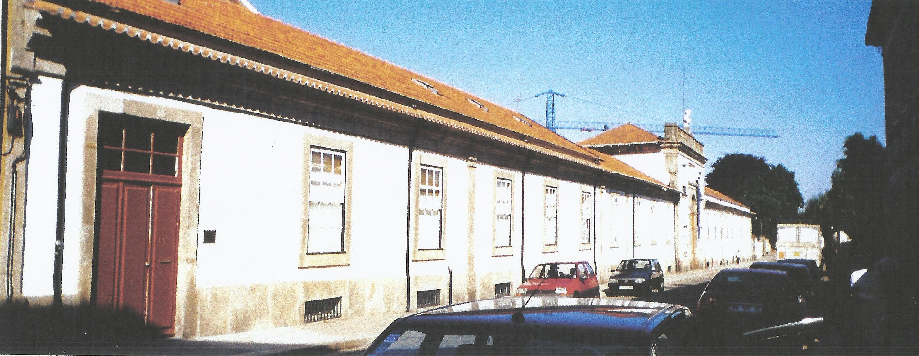 'Colégio Barão de Nova Sintra'. Pertence, atualmente, à Santa Casa da Misericórdia do Porto. A fotografia foi tirada quando o edifício foi sujeito a obras de melhoramento. Rua Barão de Nova Sintra, Bonfim, Porto